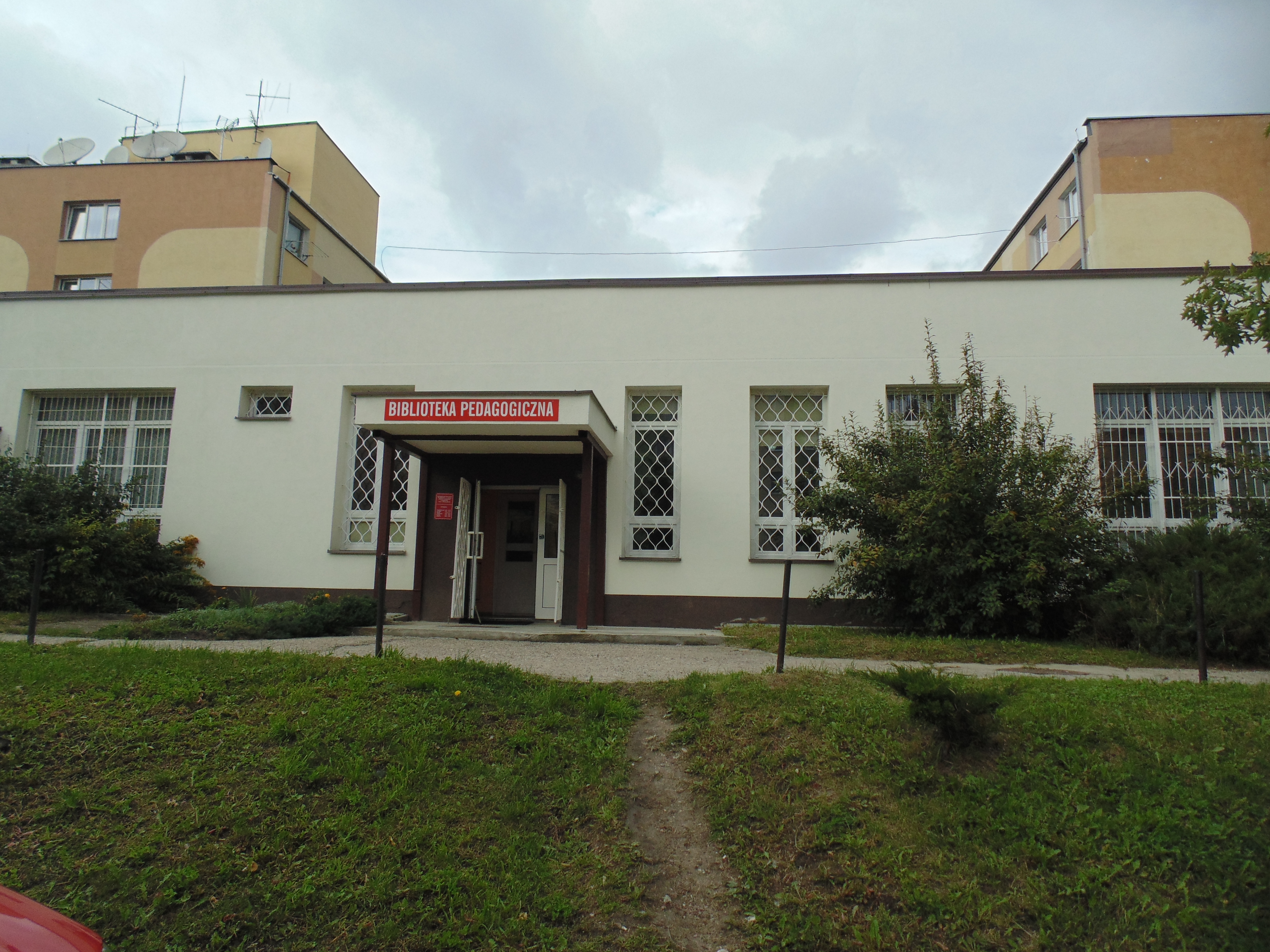 Pedagogiczna Biblioteka w Sochaczewie